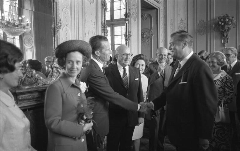 Staatsbesuch des belgischen Königspaares. Empfang im Schloß Benrath (rechts: Min. W. Weyer)